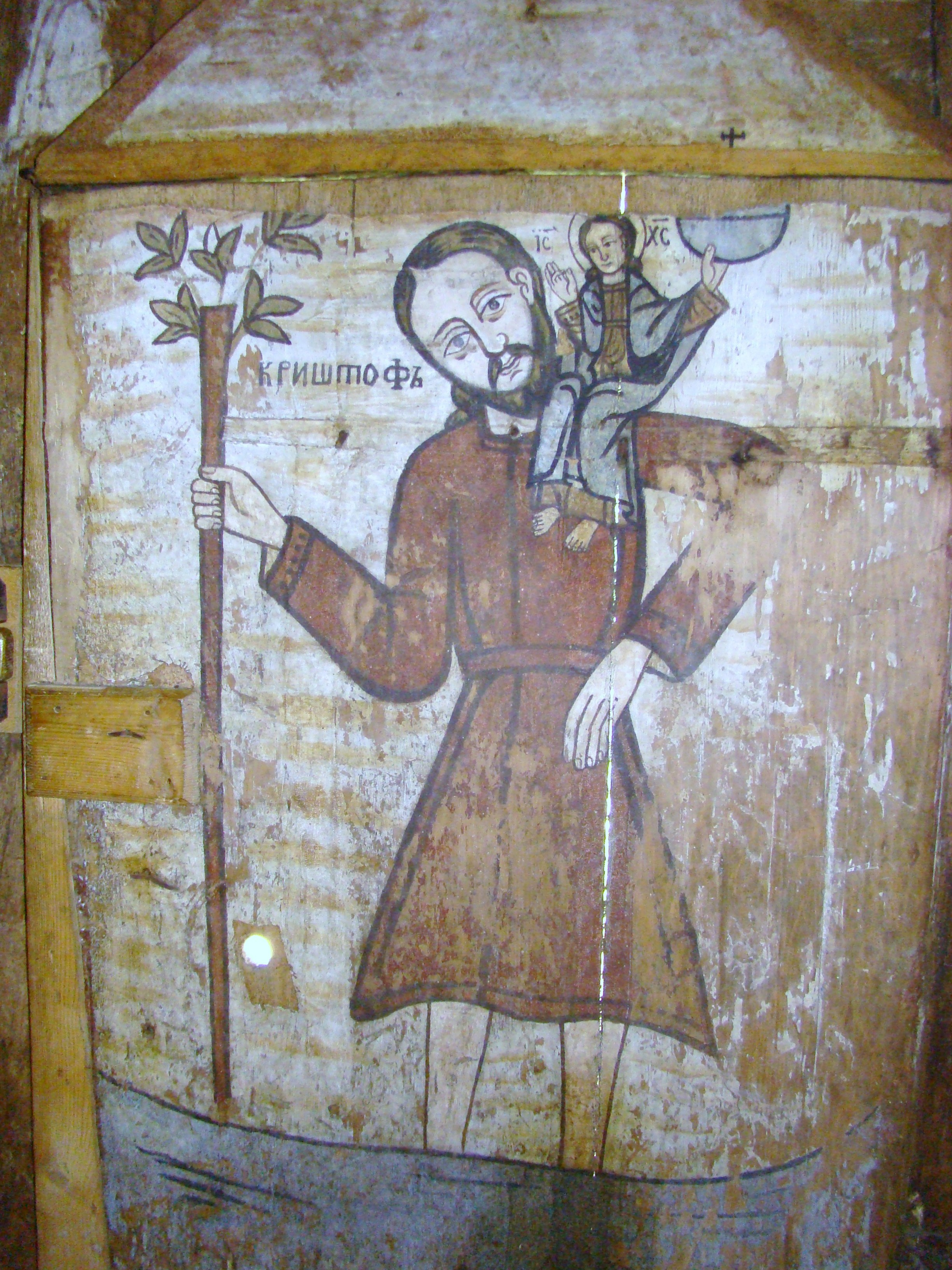 Biserica de lemn "Naşterea Maicii Domnului", sat IEUD